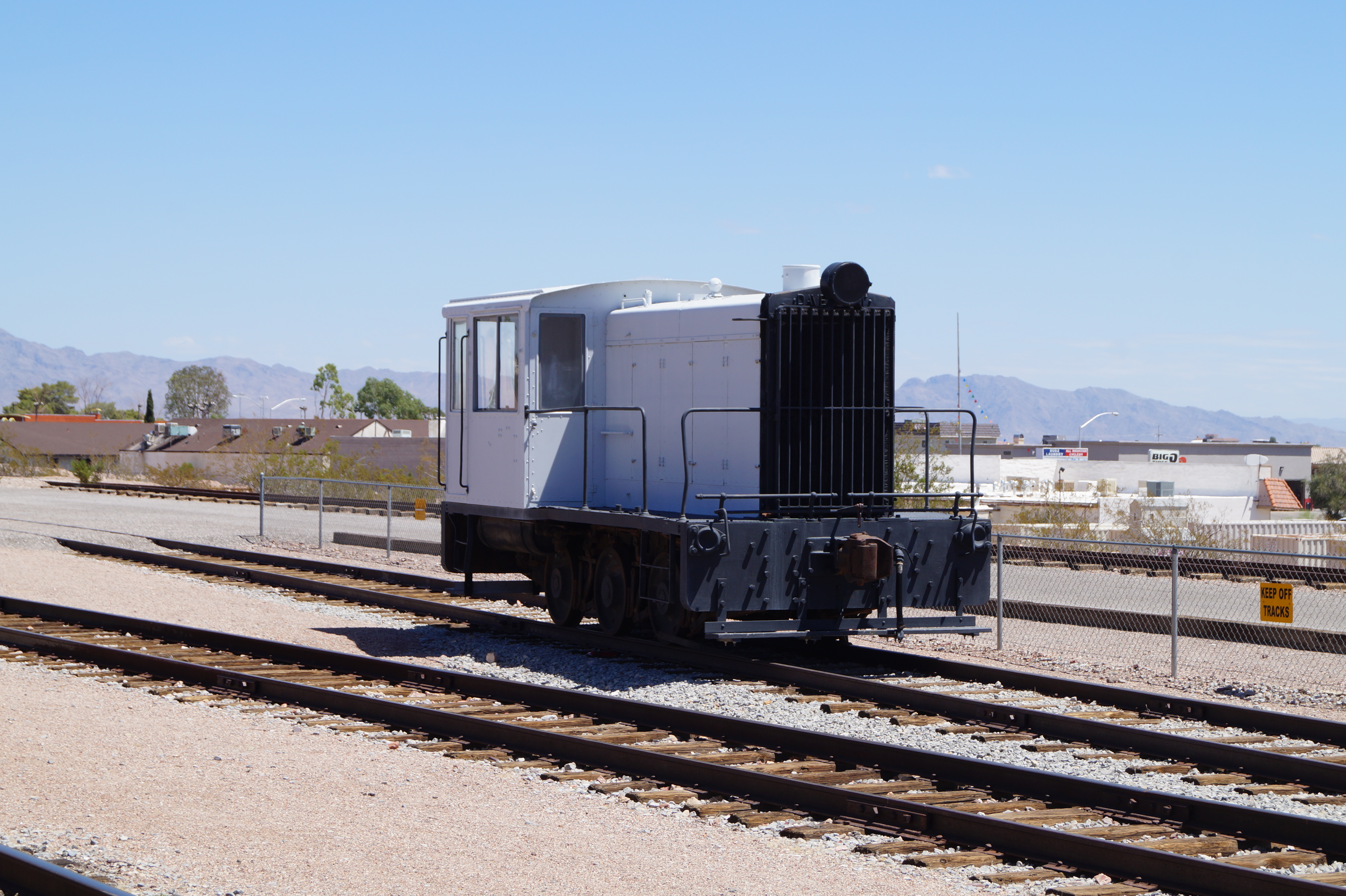 The Nevada State Railroad Museum which is an agency of the Nevada Department of Cultural Affairs. It is located at Yucca Street on the tracks of the historic Union Pacific Railroad branch Henderson-Boulder City near the former Boulder City Railroad Yards where the Hoover Dam construction equipment was unloaded in the 1930s.